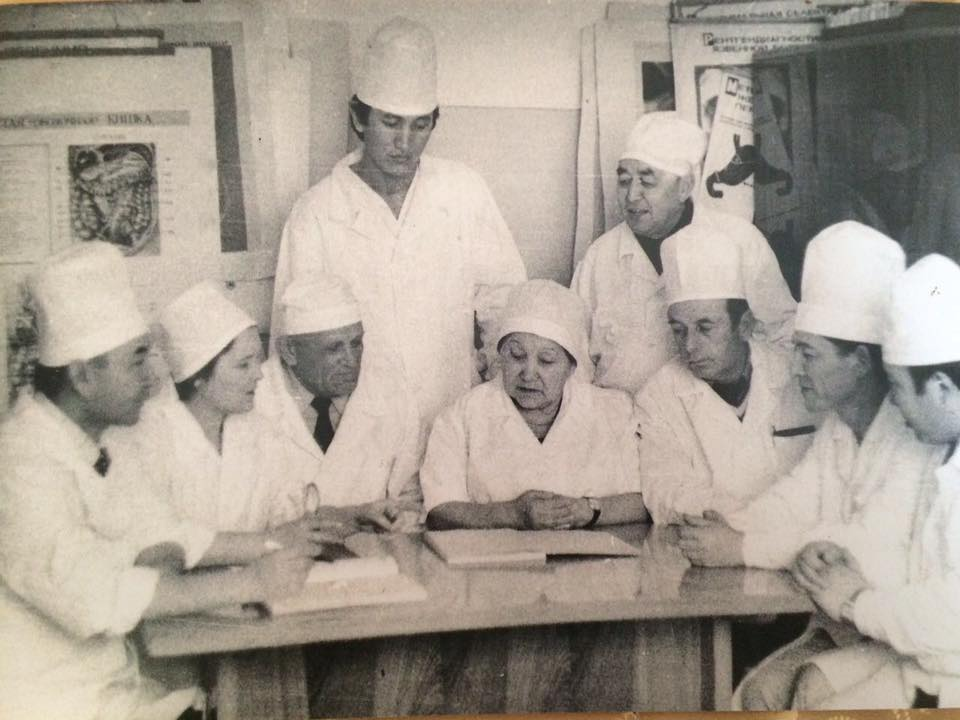 Рыскулова К. с соратниками